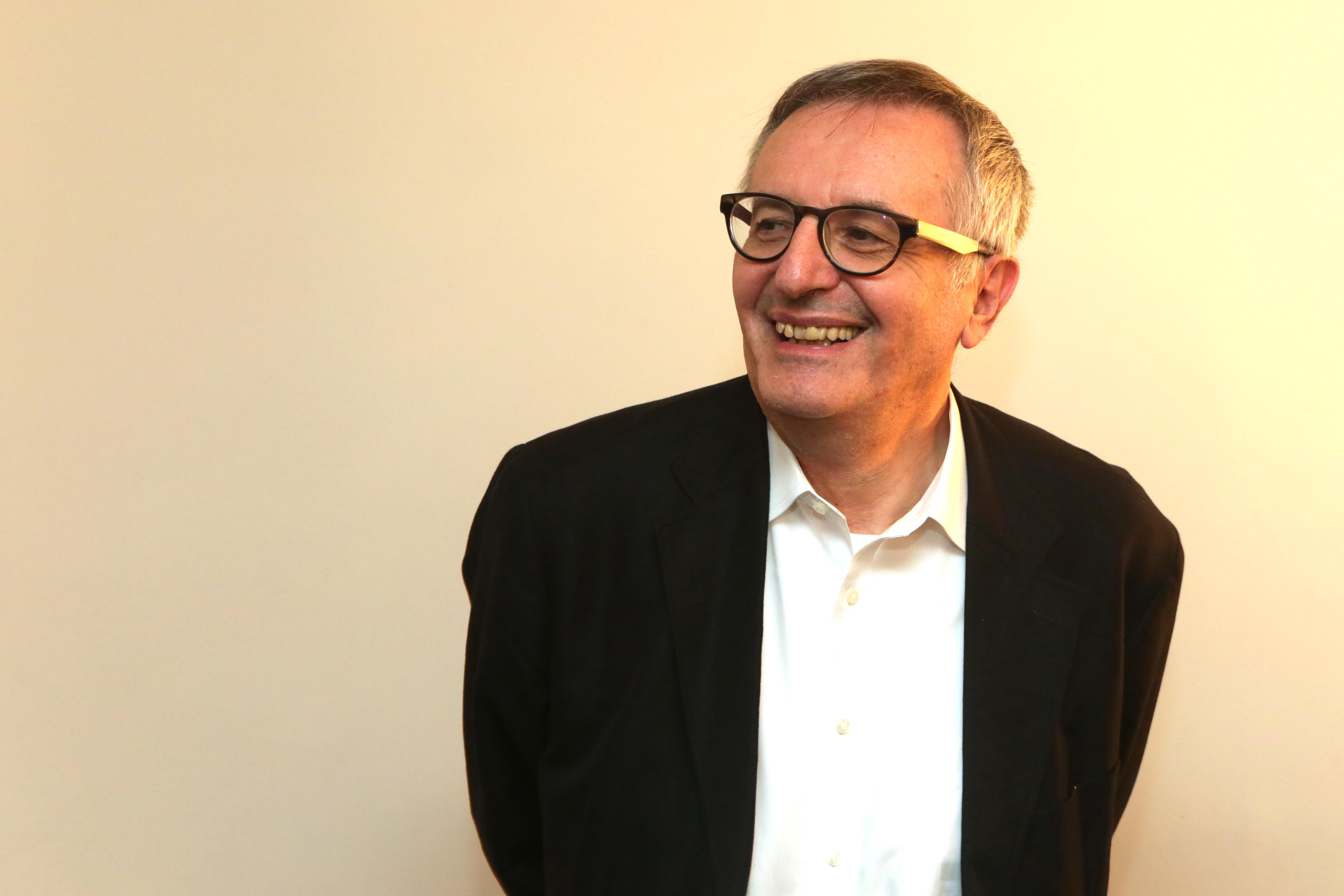 Convidado: Filósofo britânico John Gray, autor de “Cachorros de palha” Data: 06 de julho de 2015 Local: Teatro Cetip – São Paulo Crédito: Greg Salibian